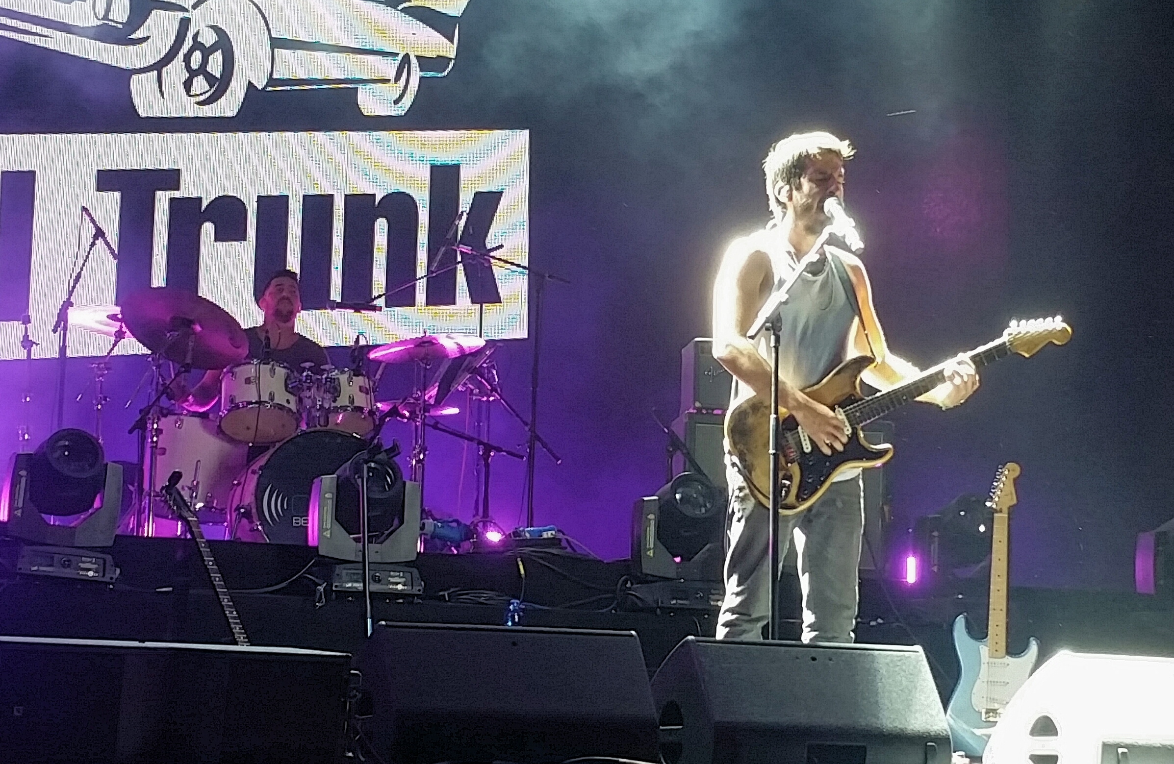 להקת פול טראנק בהופעה בטכניון, מאי 2019